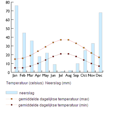 Grafiek klimaat in Pissouri